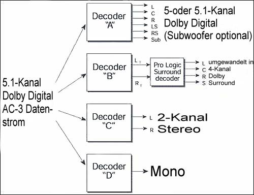 Mögliche Encodierungen eines Dolby Digital Signals